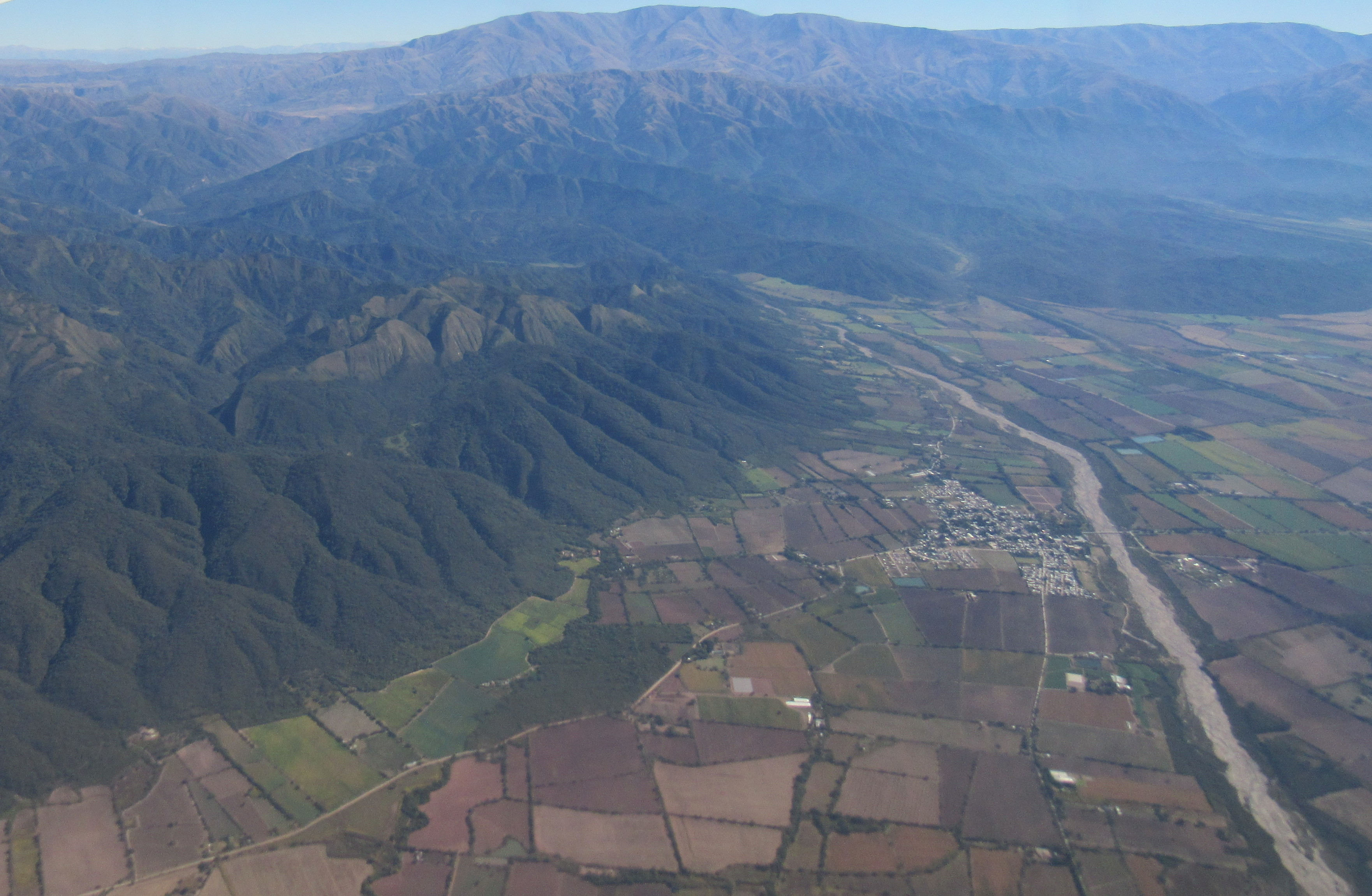 Vista aérea Chicoana, Salta. A la derecha el Río Chicoana. Atrás la Quebrada del Estoique